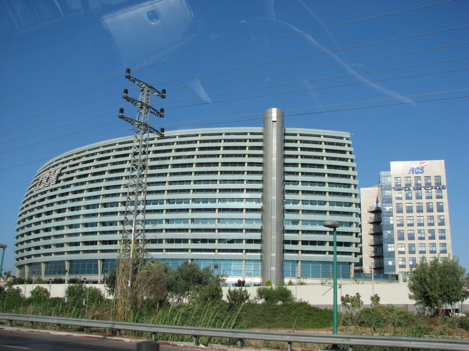 IBM, Israel